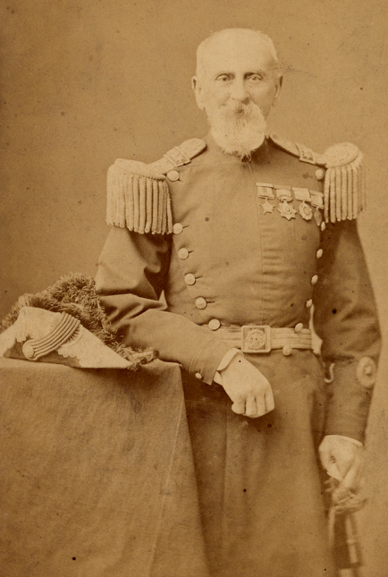 General Santiago Amengual Balbontín apodado El Manco Amengual o " El manco Glorioso" debido al brazo que una herida de bala le inutilizo en la batalla de Loncomilla.(Quillota; 23 de marzo de 1815 - † Santiago; 29 de abril de 1898), militar chileno